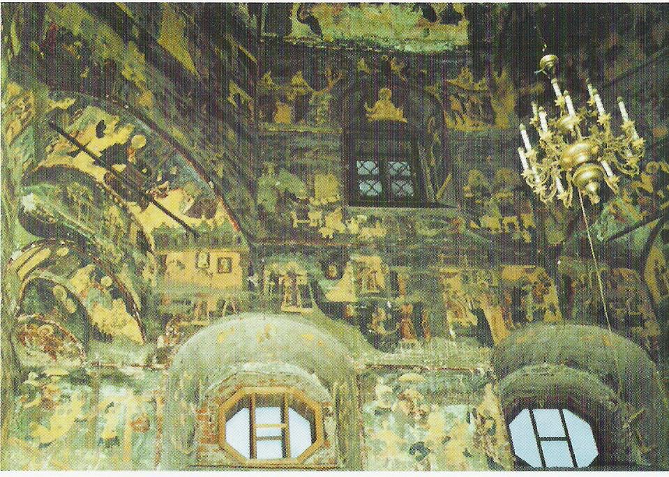 Фрески церкви Покрова в Вологде